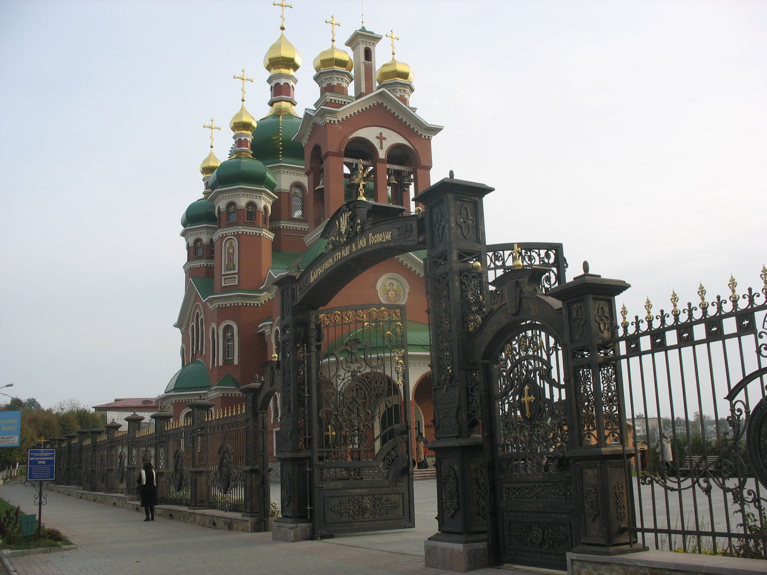 Церква в Тальному